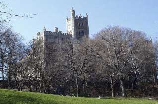 APRCHS Building Skyline